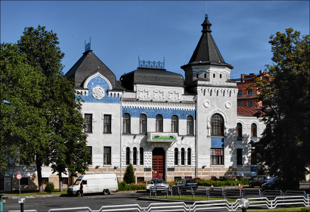 Магілёўскія відарысы